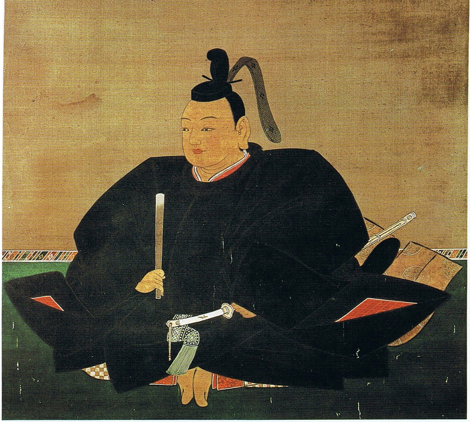 鎌倉幕府二代将軍 源頼家像 京都 建仁寺所蔵